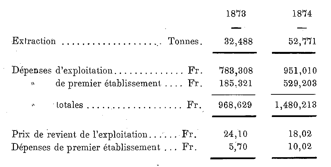 Prix de revient de la Compagnie des Charbonnages de Réty, Ferques et Hardinghen en 1873 et 1874.